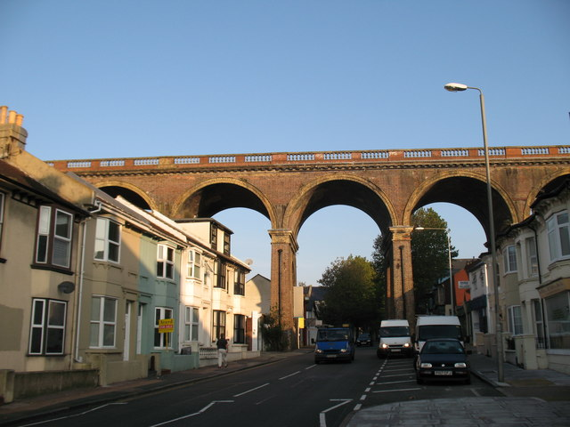 London Road viaduct